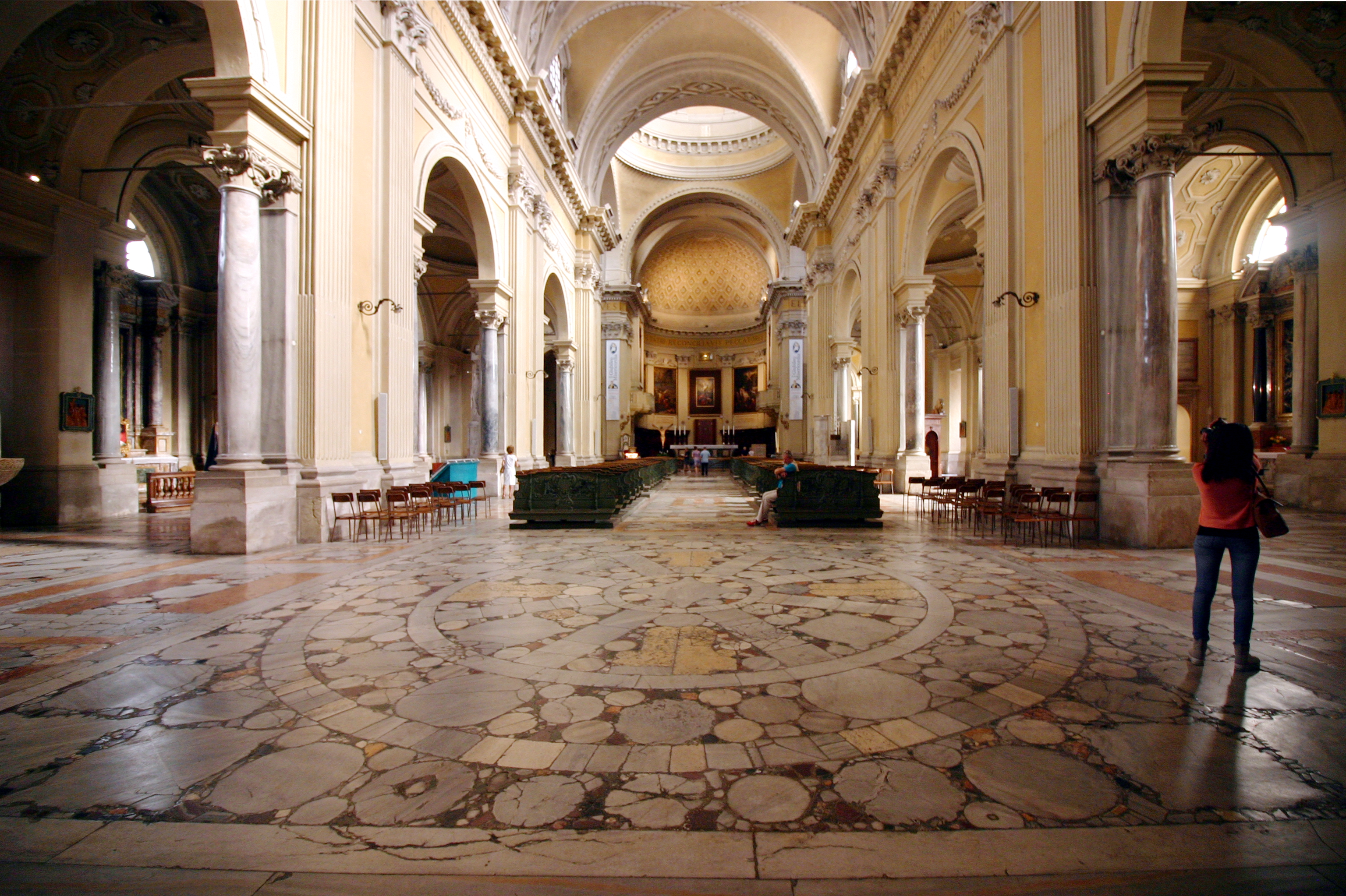 Duomo - Ravenna